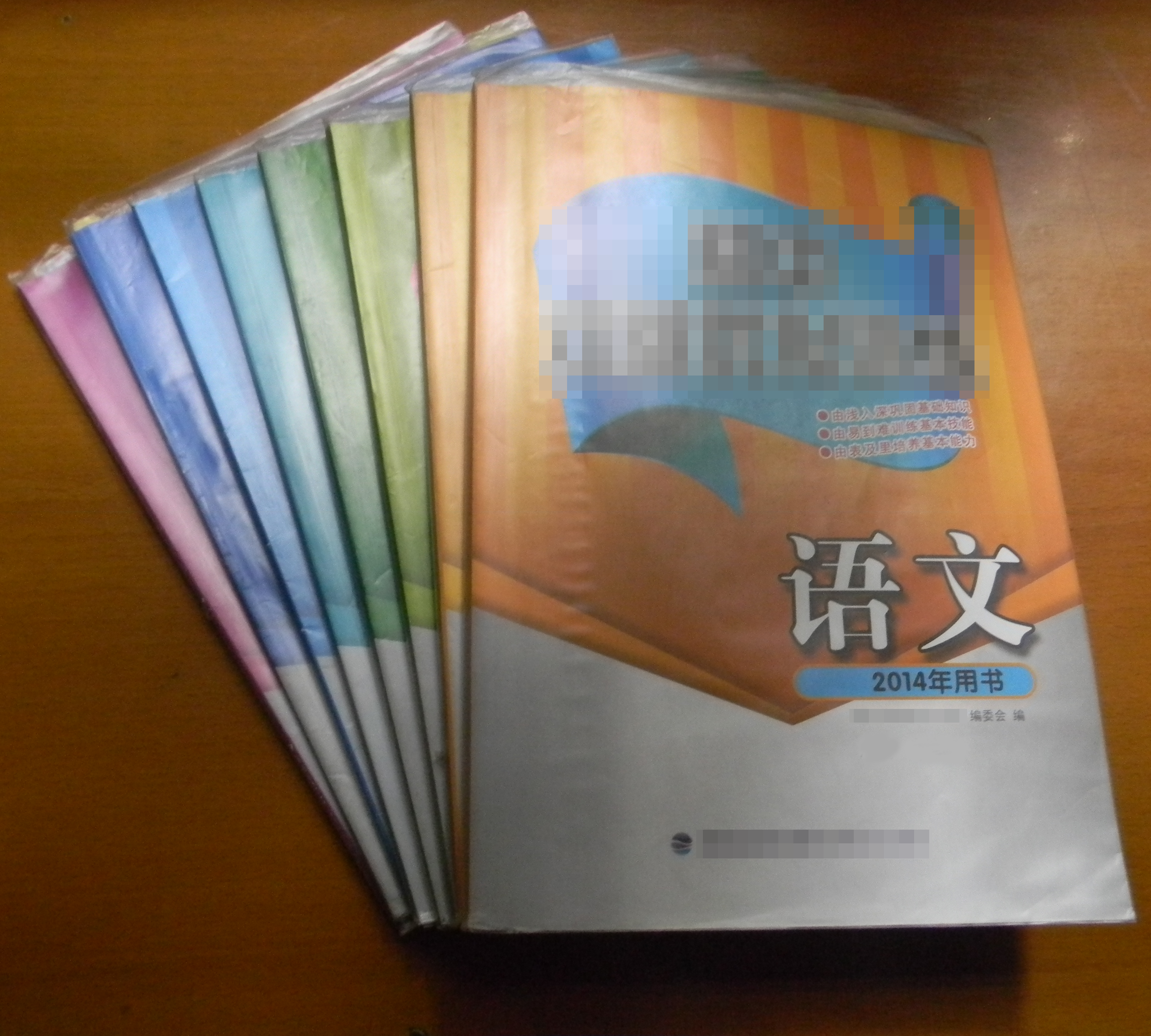 福州中考教辅